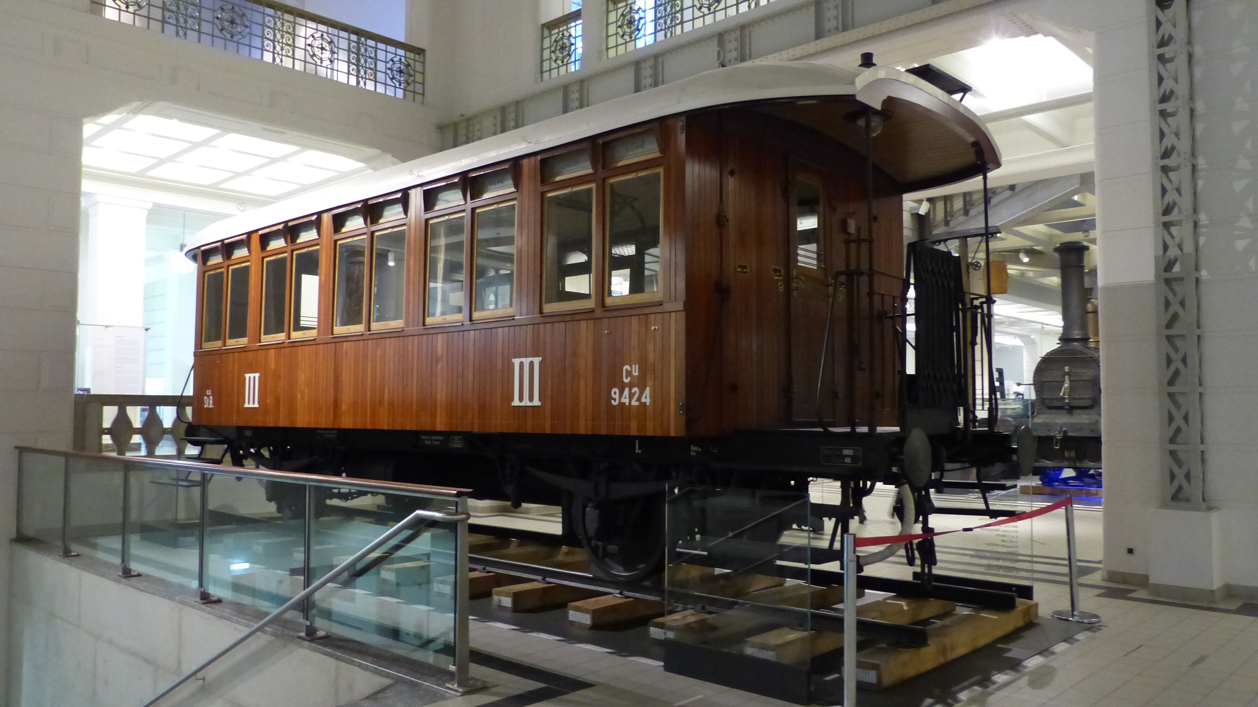 Personenwagen Cu 9424, III. Klasse, Wiener Stadtbahn um 1900; Exponat im Technischen Museum Wien